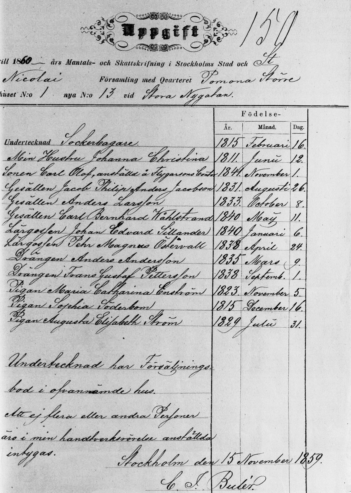 Stora Nygatan 13, boende i Pomona större 1